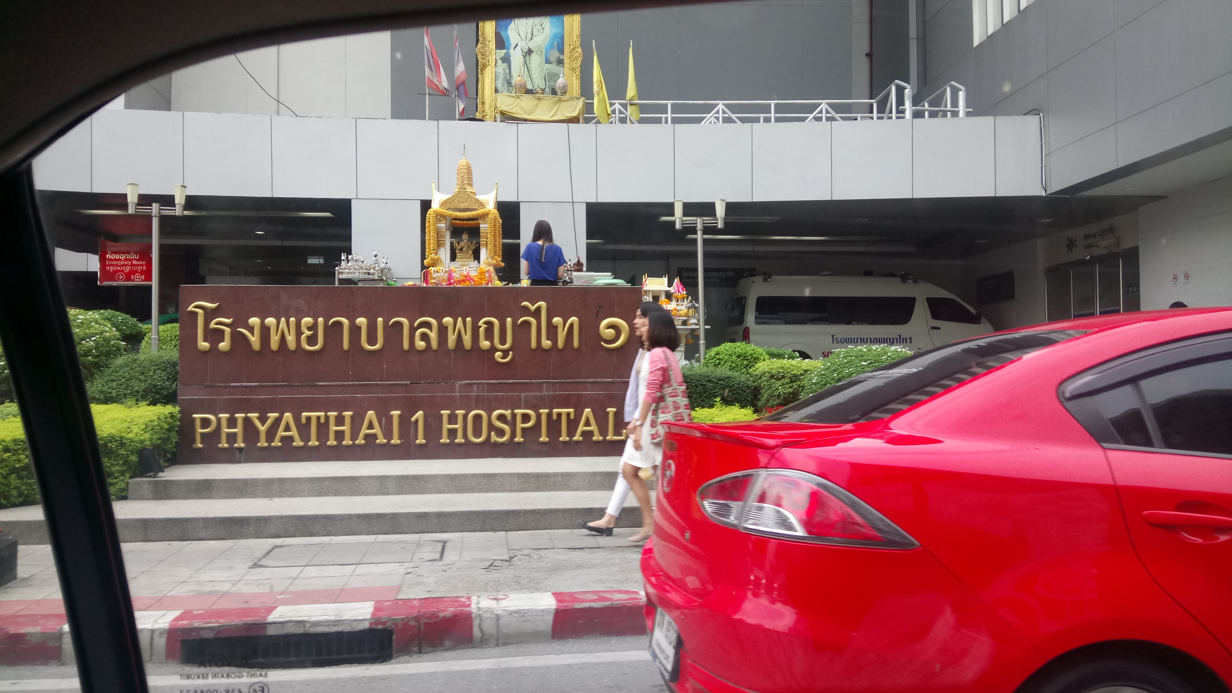 Phyatai 1 Hospital